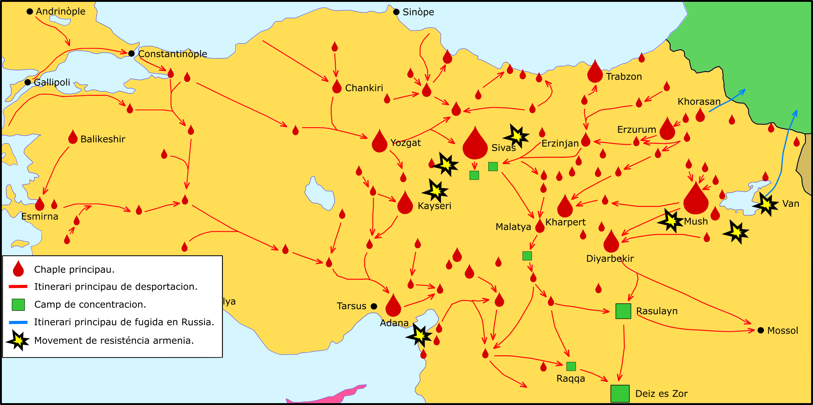 Genocidi armèni de 1915-1916.